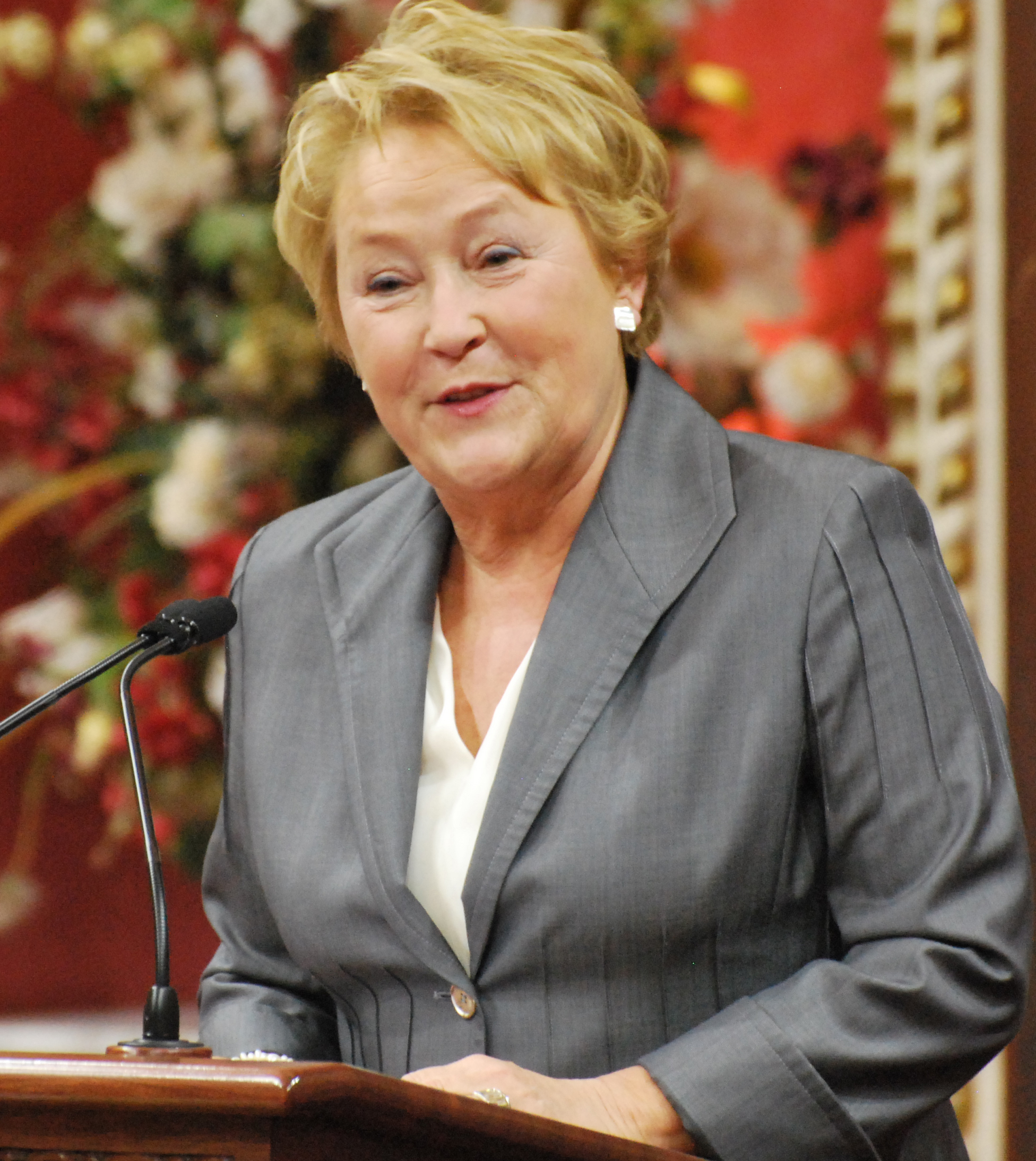 Pauline Marois lors de la cérémonie 2013 de remise de l'ordre national du Québec.